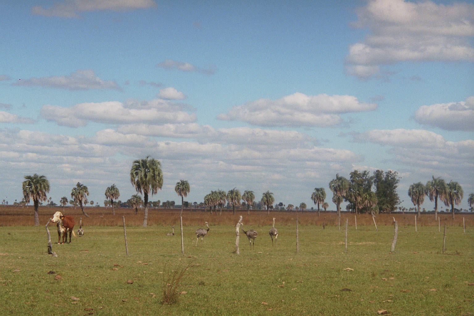 Paisaje de Mercedes Cossio, Goya, Corrientes, Argentina - Landscape